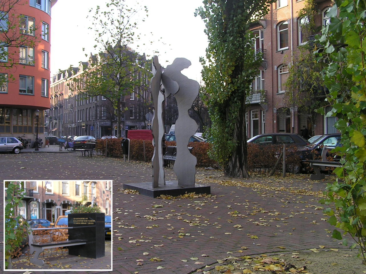 Monument ter nagedachtenis van de slachtoffers van de SLM-ramp in 1989. De kunstenaar is Guillaume Lo-A-Njoe; het kunstwerk werd in 1991 geplaatst. De uitsparing tussen de drie aluminium platen beeldt een figuur uit. Het bankje met de zware zwarte steen hoort bij het monument. Het kunstwerk staat op het 's-Gravesandeplein in Amsterdam-Oost, niet ver van het café De Draver dat het stamcafé was van enkele van de overledenen.